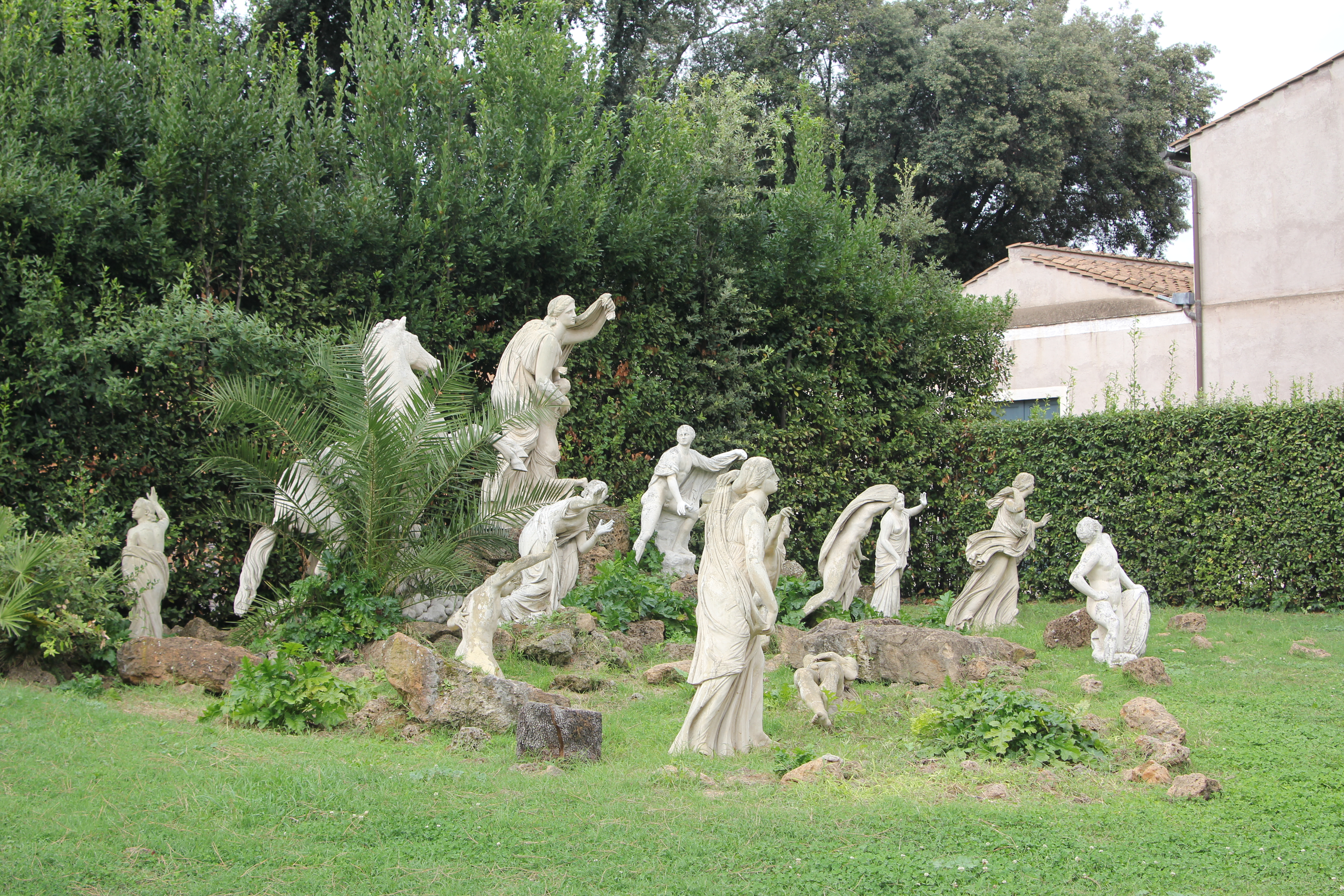 Le carré des Niobides est une fontaine conservée dans les Jardins de la Villa Médicis et réalisée par Balthus à partir de moulages d'antiques.